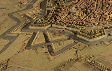 Vue du couvre-face de Menin. Vue centrée sur l'ouvrage pour utilisation dans l'article couvre-face.